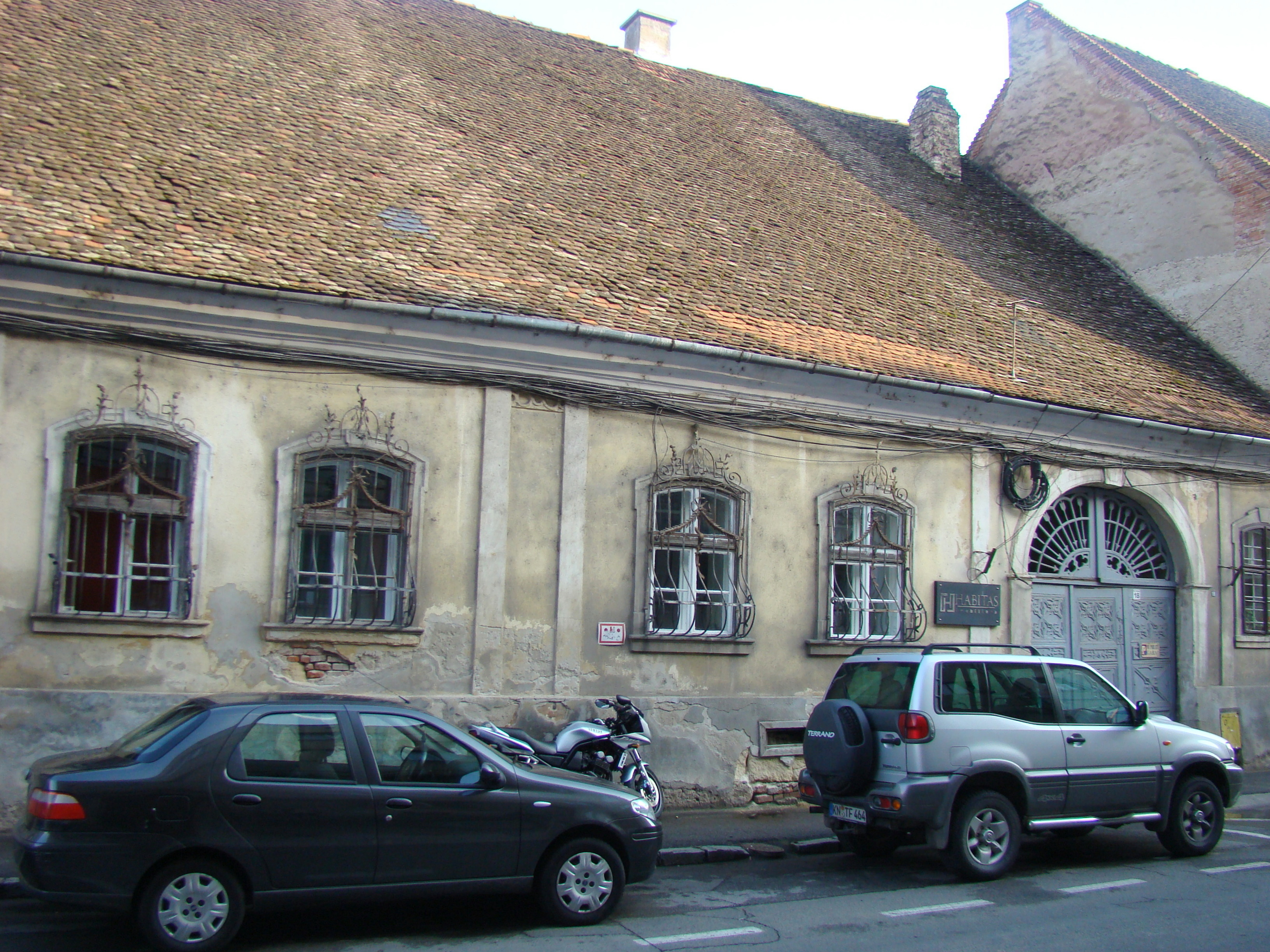 Casă monument strada I.C.Brătianu nr.18